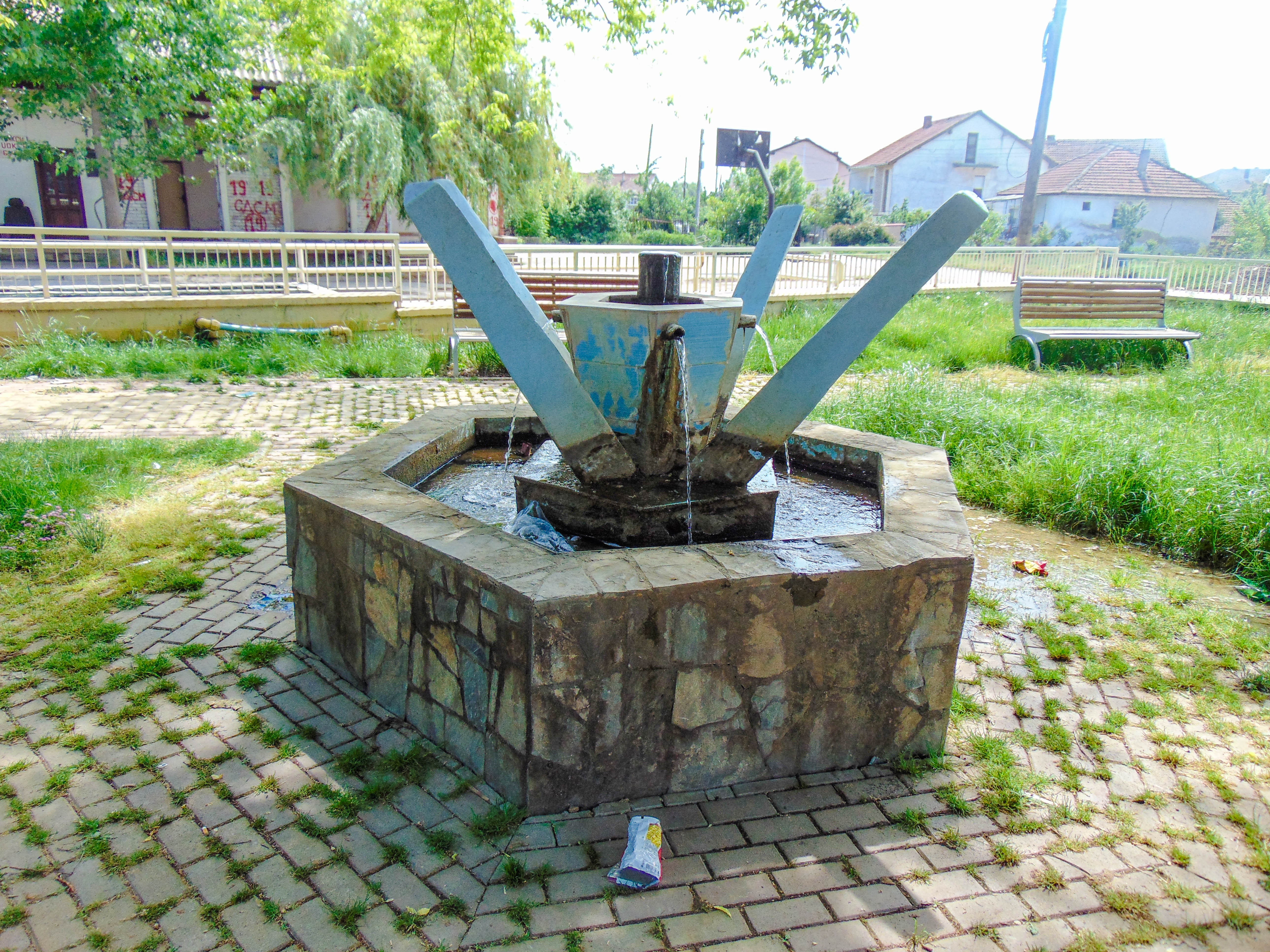 Раклиш